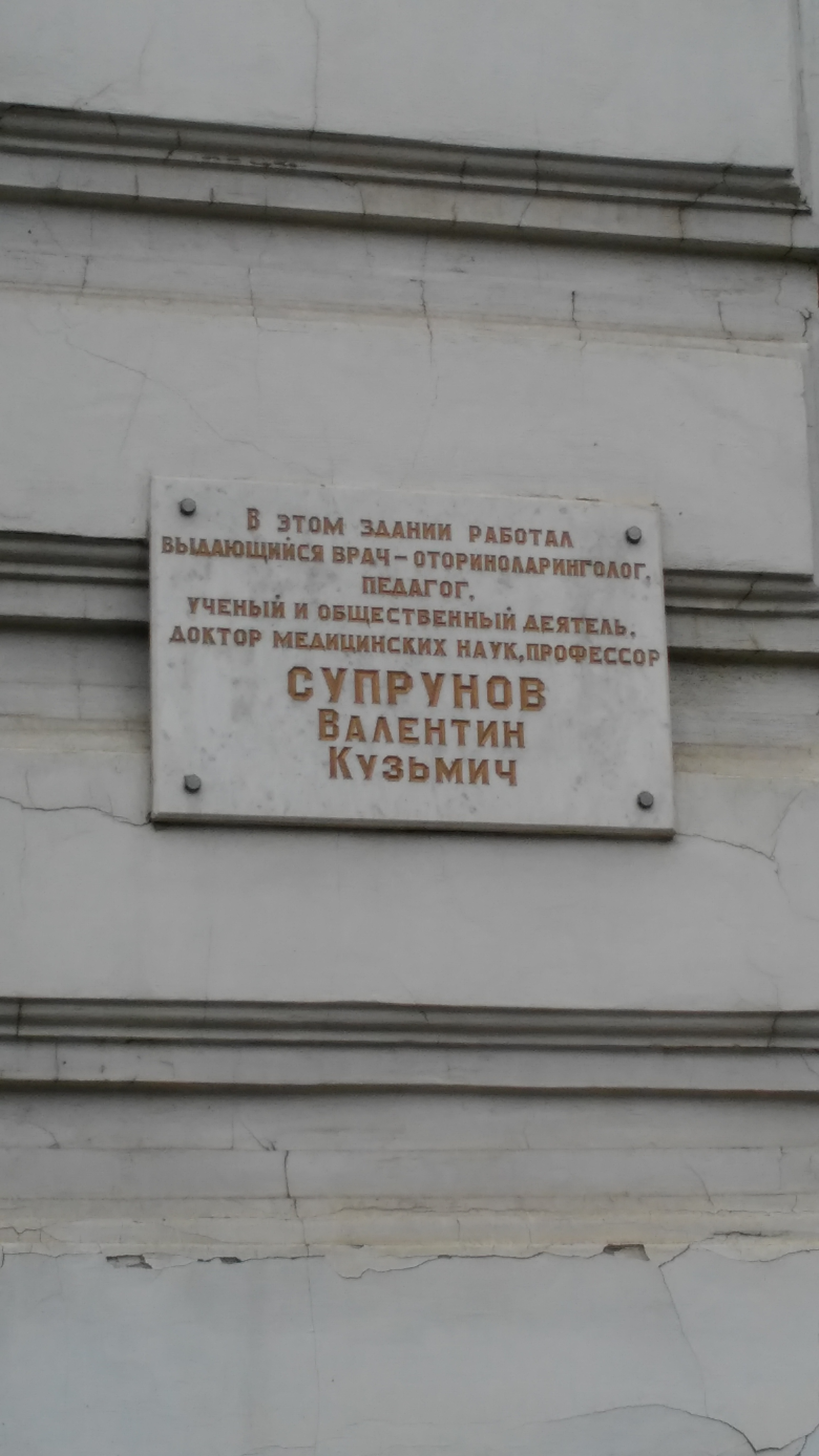 Мемориальная доска Супрунову В. К. на доме № 11 по улице Седина в Краснодаре. 2017